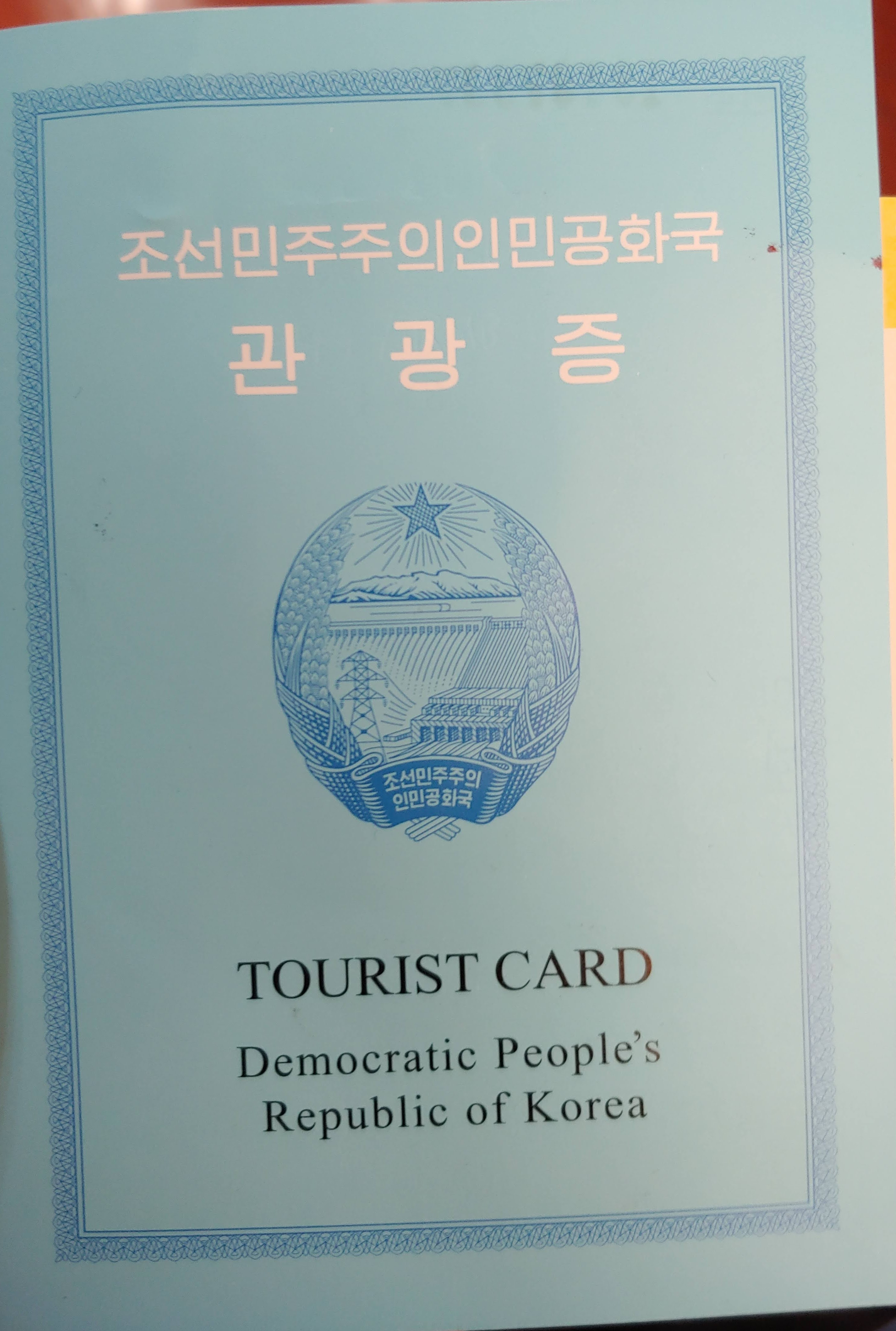 Carte de tourisme qui fait office de Visa pour les étrangers visitant la Corée du Nord